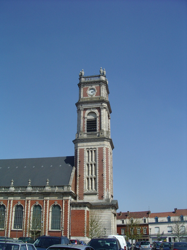 Eglise Saint Martin Harnes